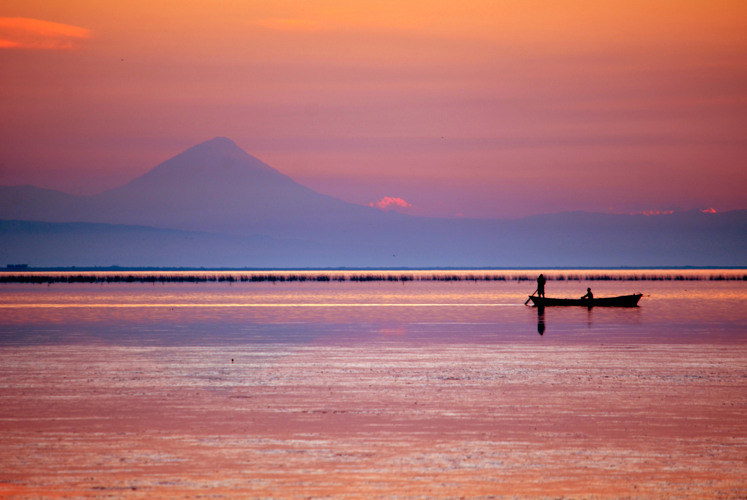 A gift for (A & A Nouri) - تقدیم به خانوادۀ محترم نوری